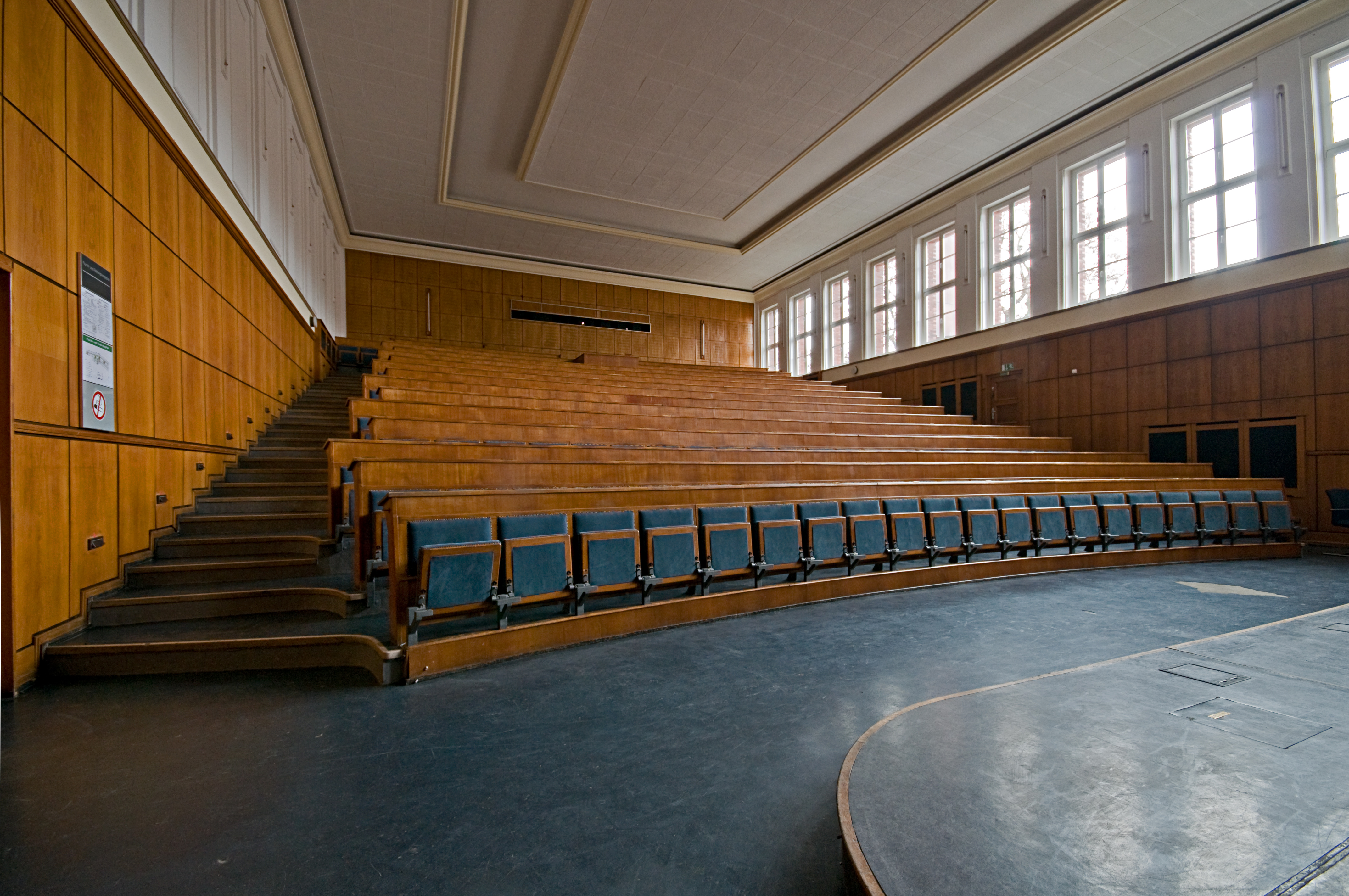 Industriepark HöchstBehrensbau: Hörsaal